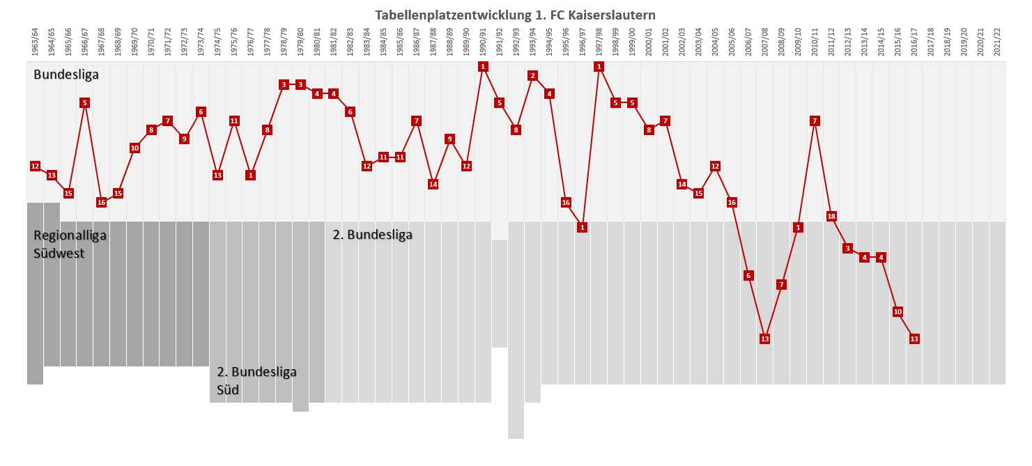 Tabellenplatzentwicklung 1. FC Kaiserslautern ab 1963/64